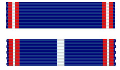 Eigen tekening. Linten van de orde en de medaille en van de medaille (honorair) Robert Prummel